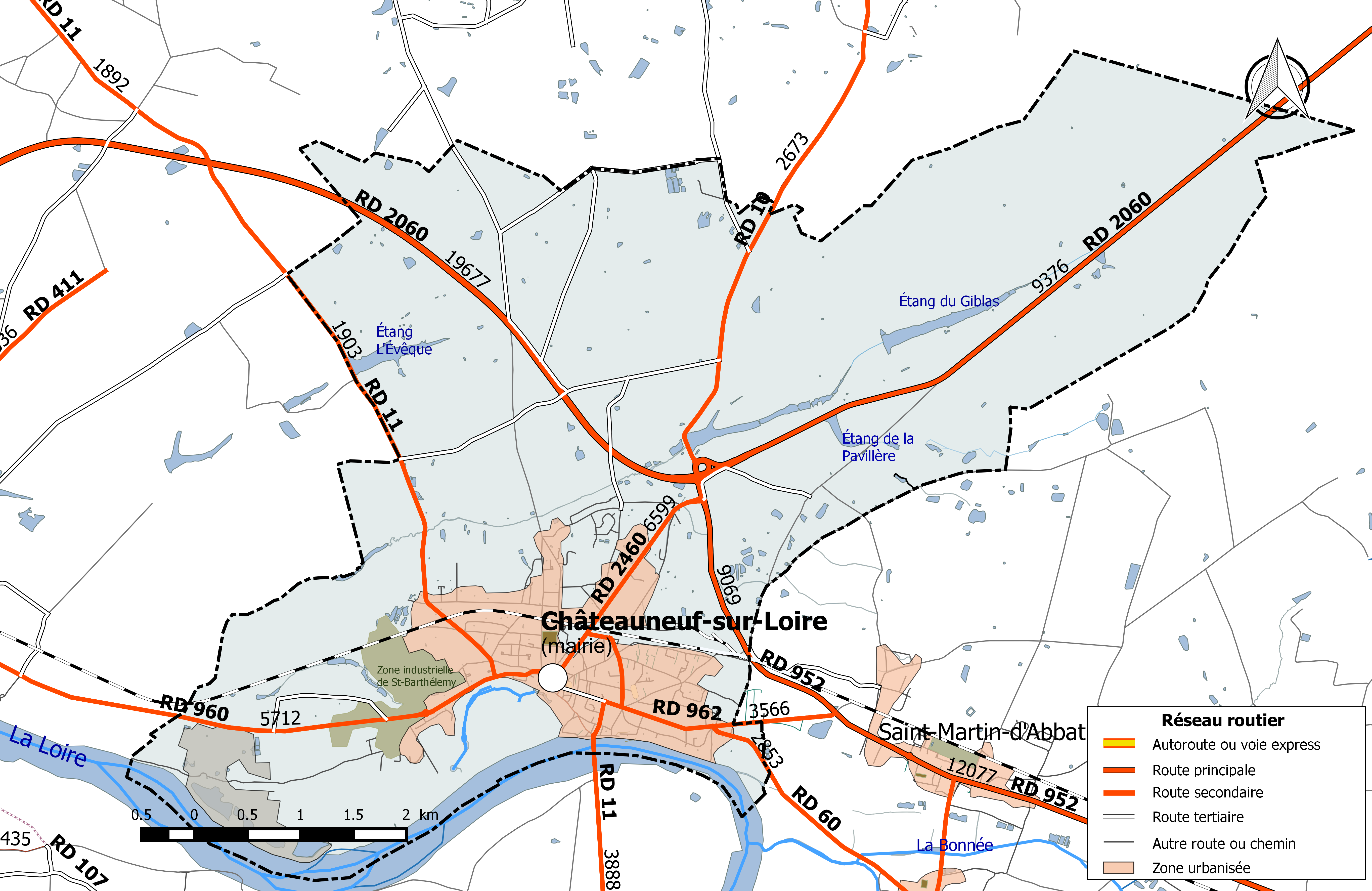 Carte du réseau routier de la commune de Châteauneuf-sur-Loire.